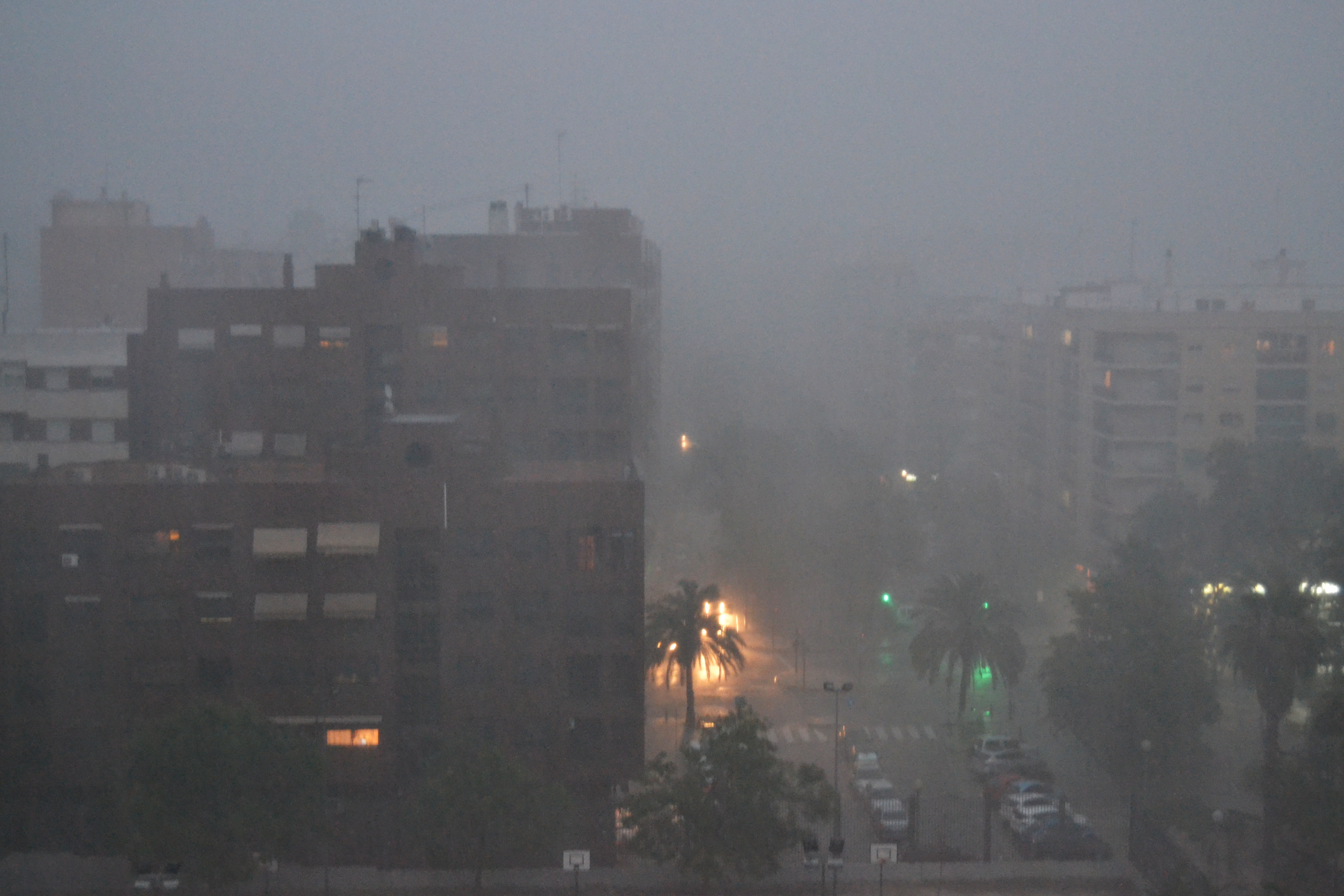 Pluja torrencial a Algirós, València.